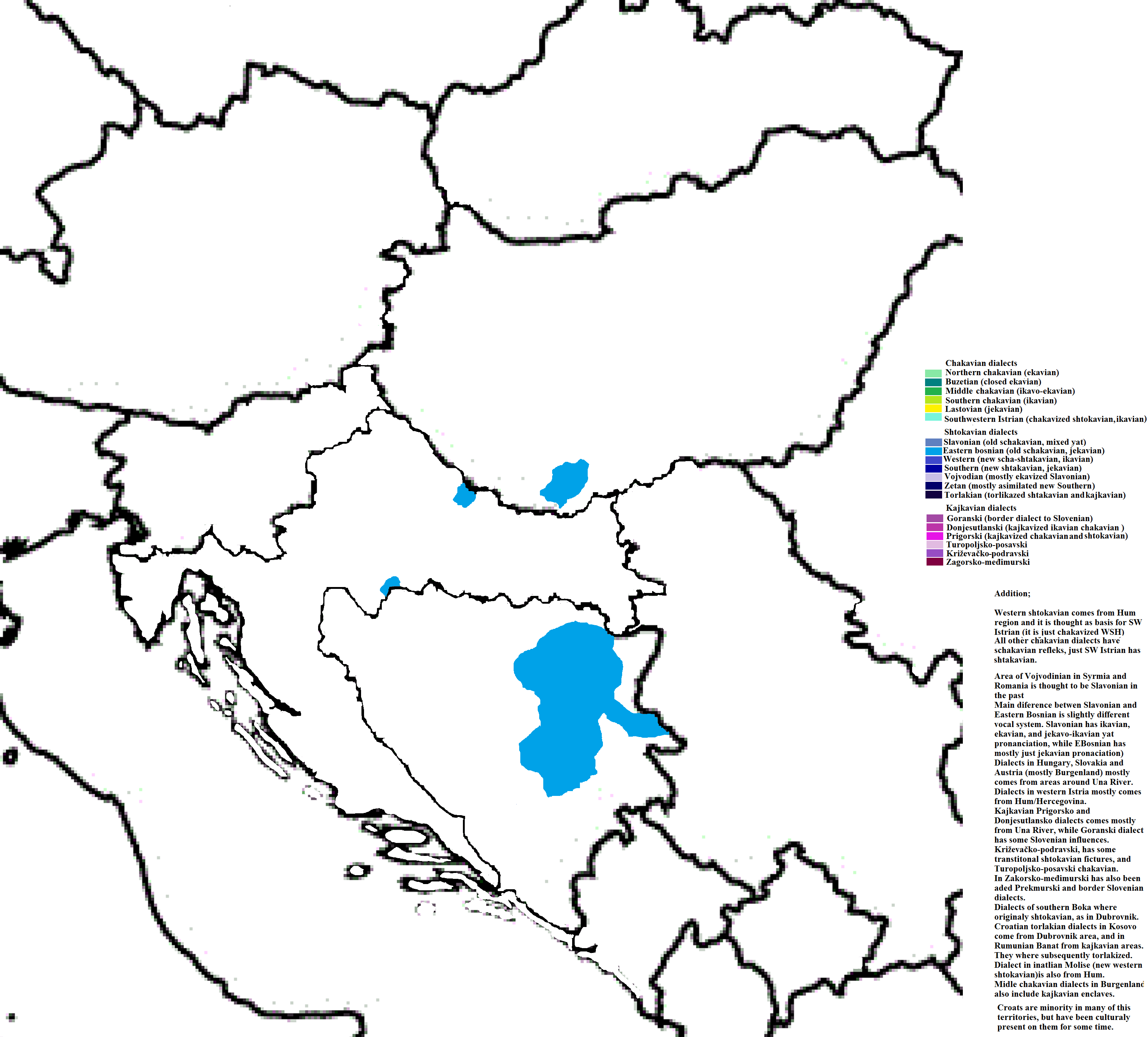 istočno bosanski